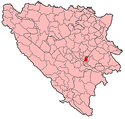 Grad Sarajevo u Bosni i Hercegovini.